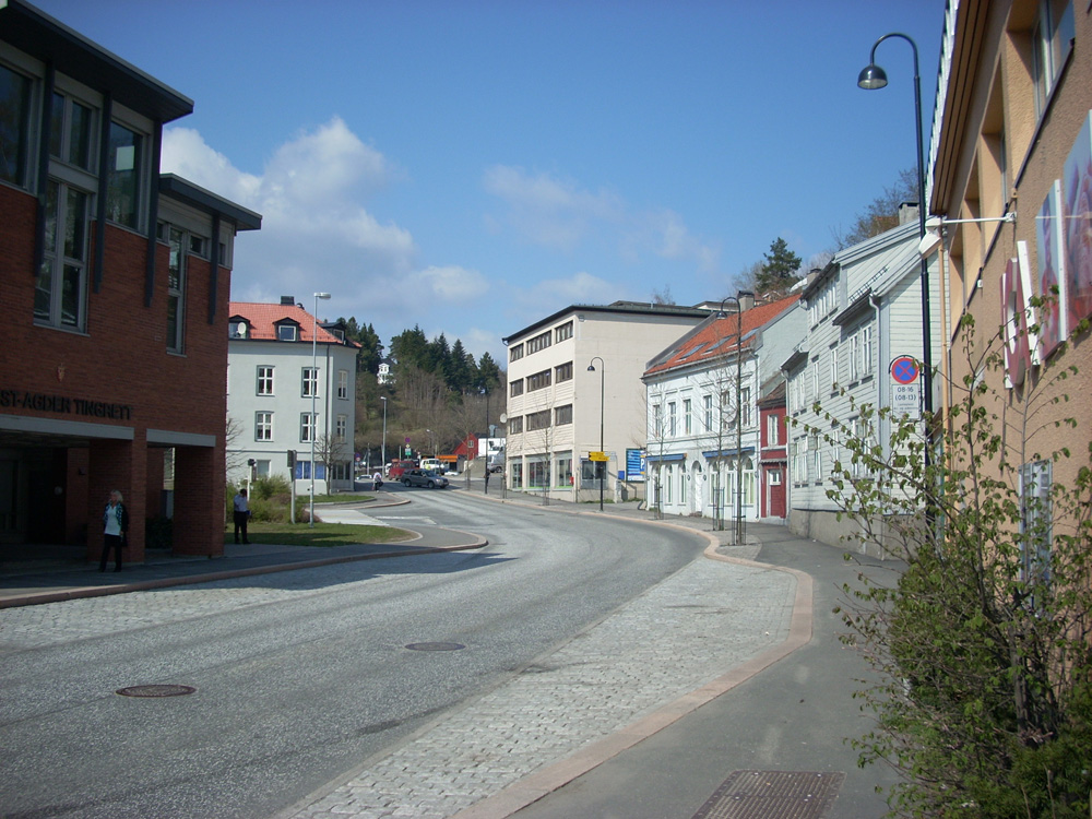 Blødekjær, bydel i Arendal